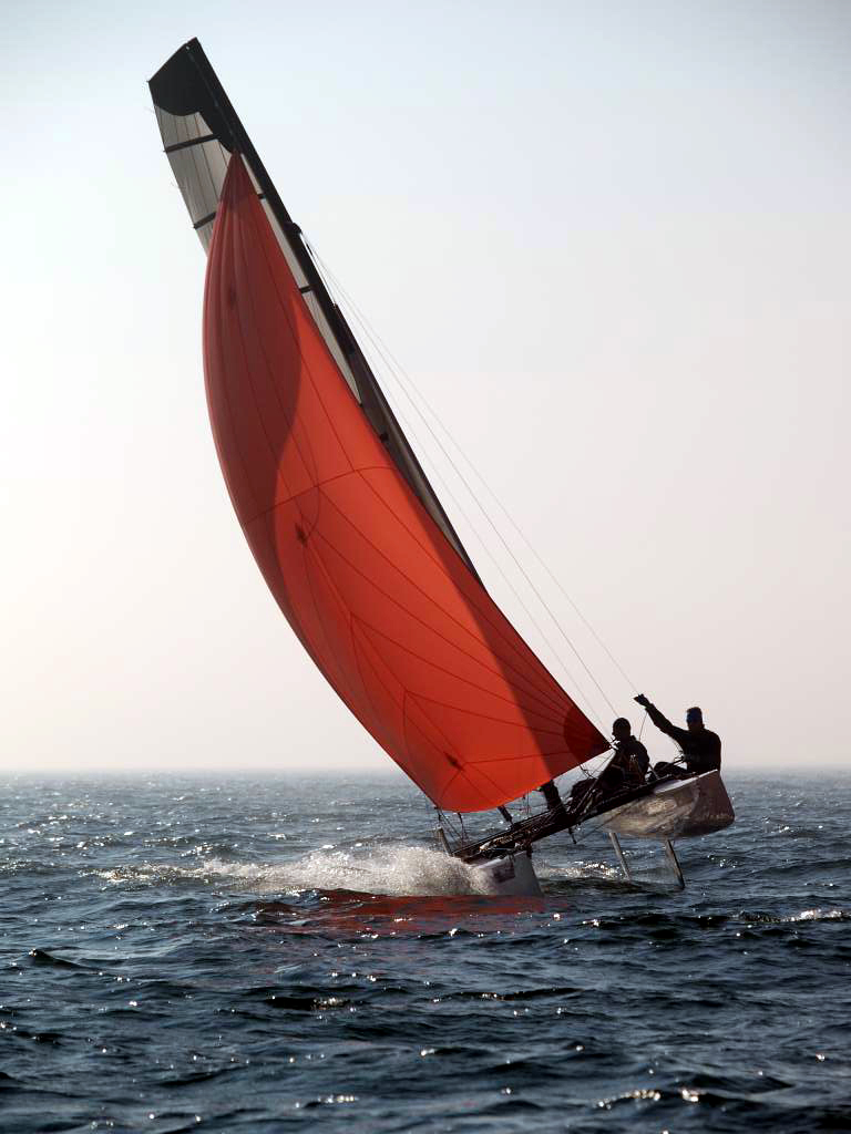 Hobie Cat Tiger, purjehduskilpailu, Suomen Urheiluveneliitto, Helsinki